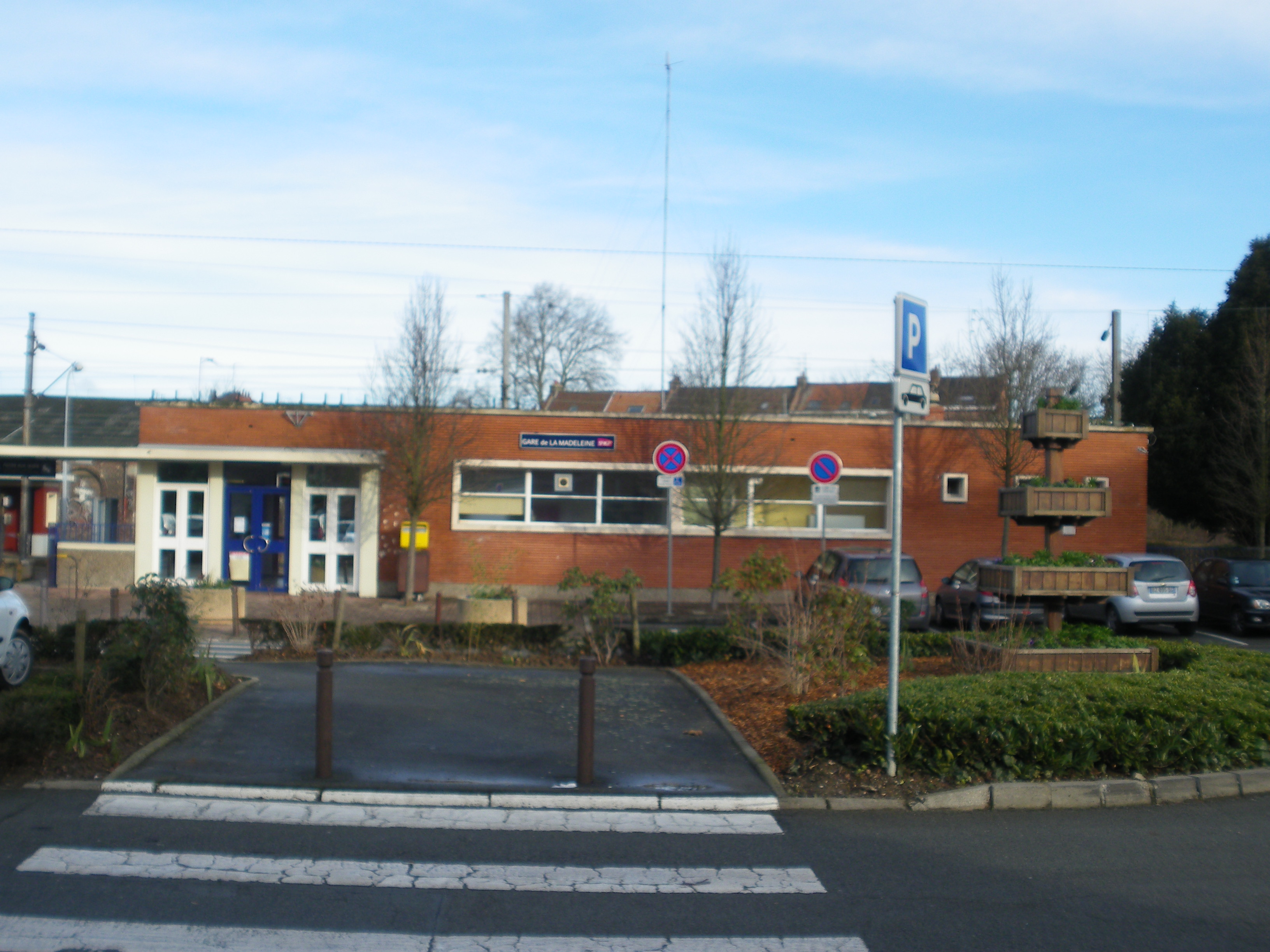 Vue du bâtiment principal de la gare de La Madeleine.